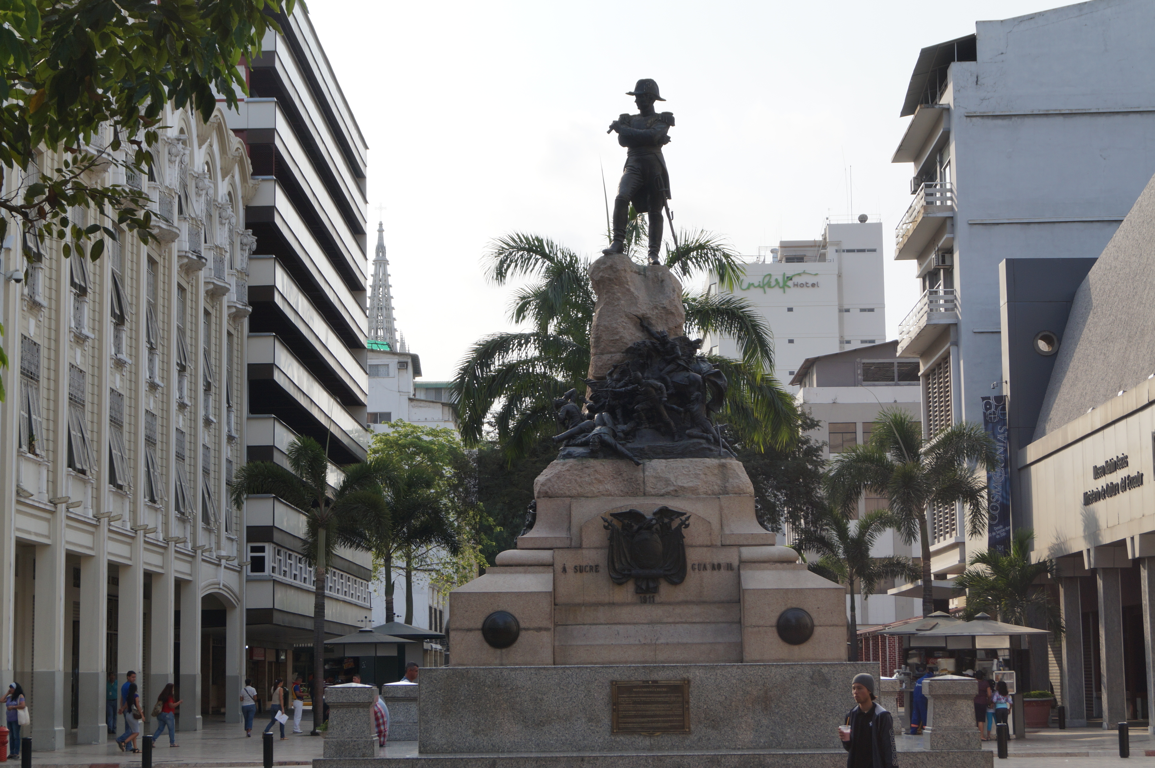 Monumento al General Antonio José de Sucre en Guayaquil, Ecuador